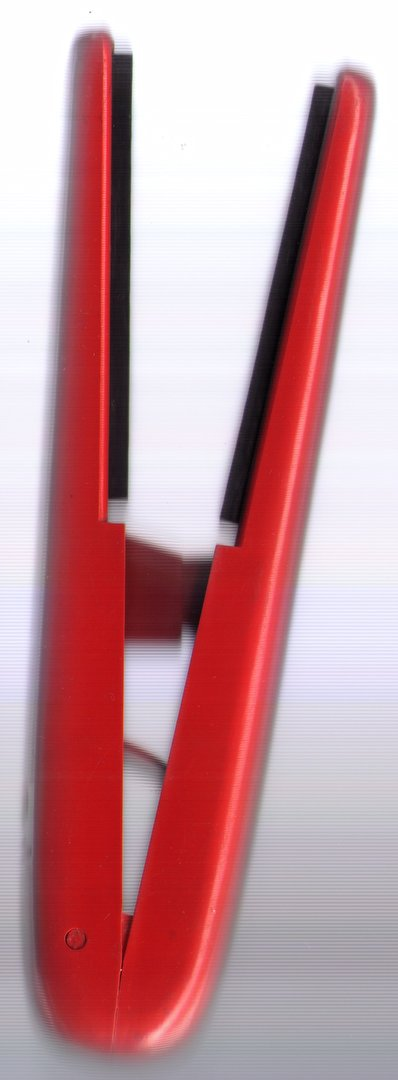 Filmabstreiferzange